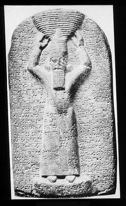 Assurbanipal als hoher Priester